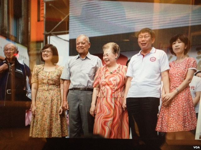 中文（台灣）: 无党籍台北市长候选人柯文哲夫妇（右一、右二）在造势大会上